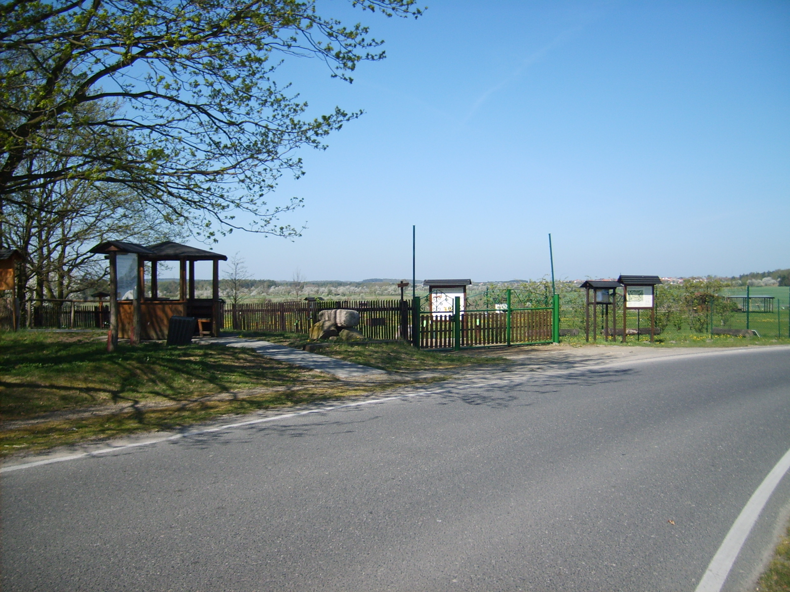 Eingang vom Pomologischen Garten in Döllingen